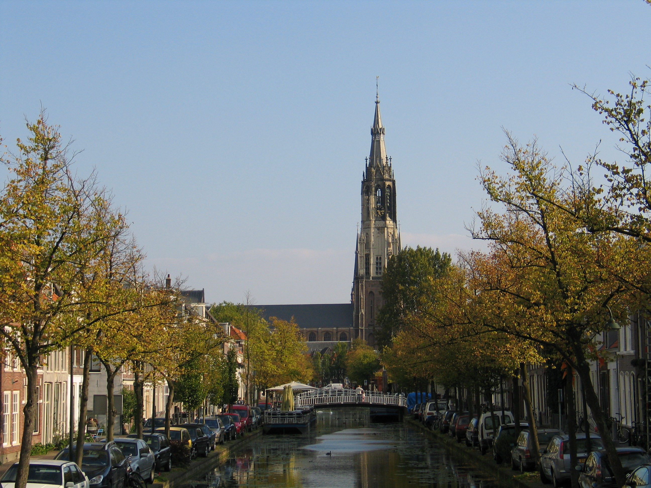 De Nieuwe Kerk vanaf de Verwersdijk